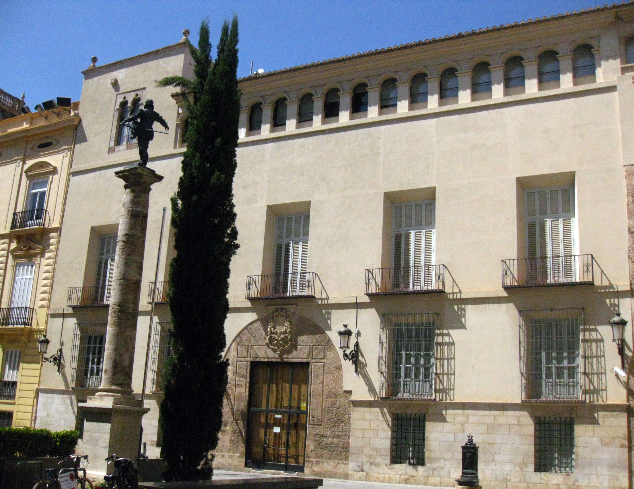 Palau del Marqués de la Scala (València)